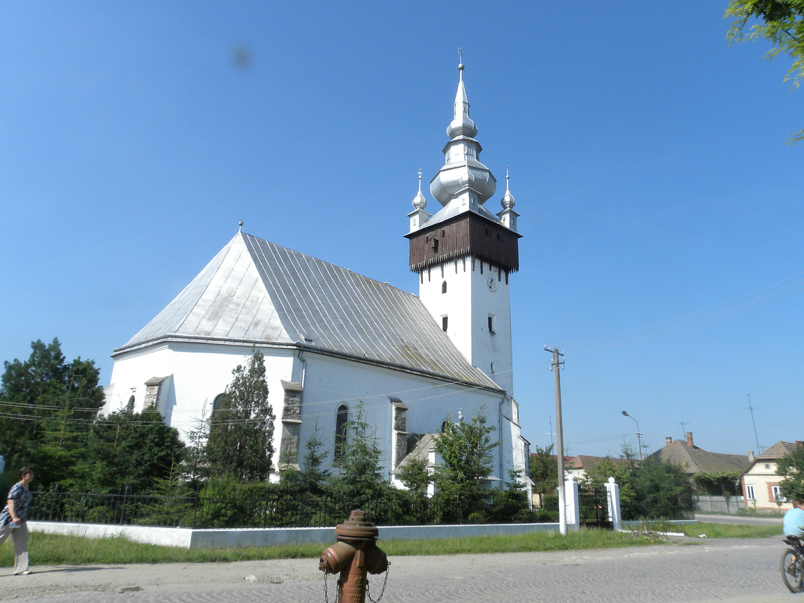 Vary